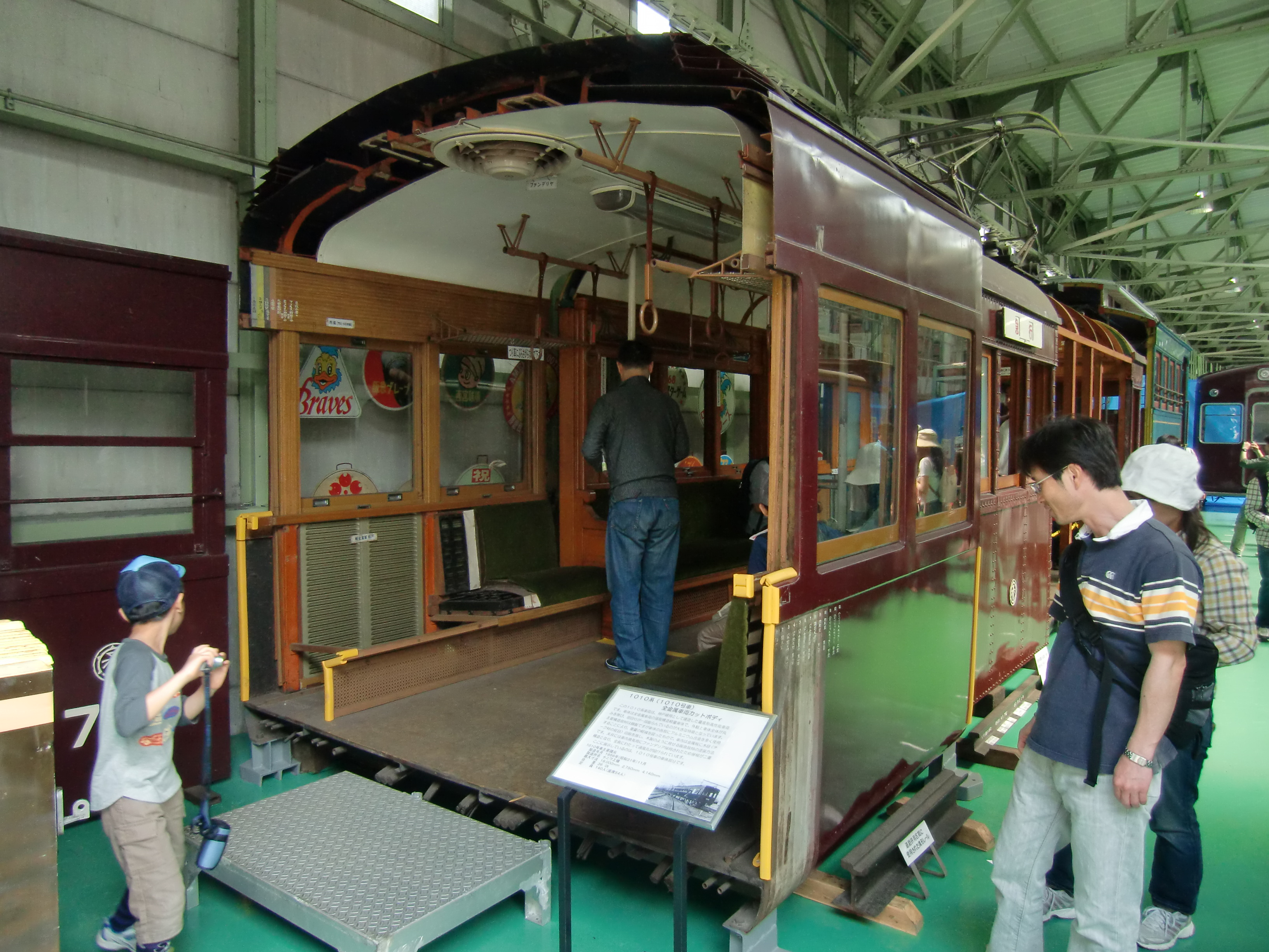 保存されている1010の車体断面。独特の2重屋根構造も分かります。2011.5.8 正雀工場内の阪急ミュージアムにて撮影